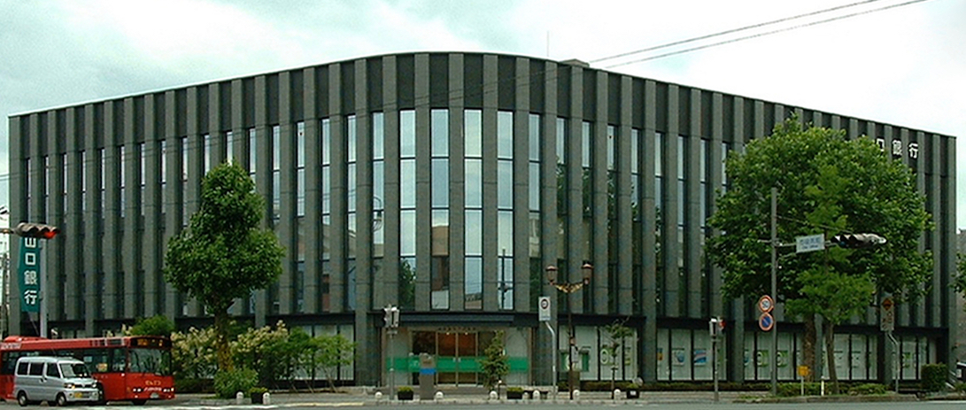 山口銀行宇部支店。2010年7月11日撮影。